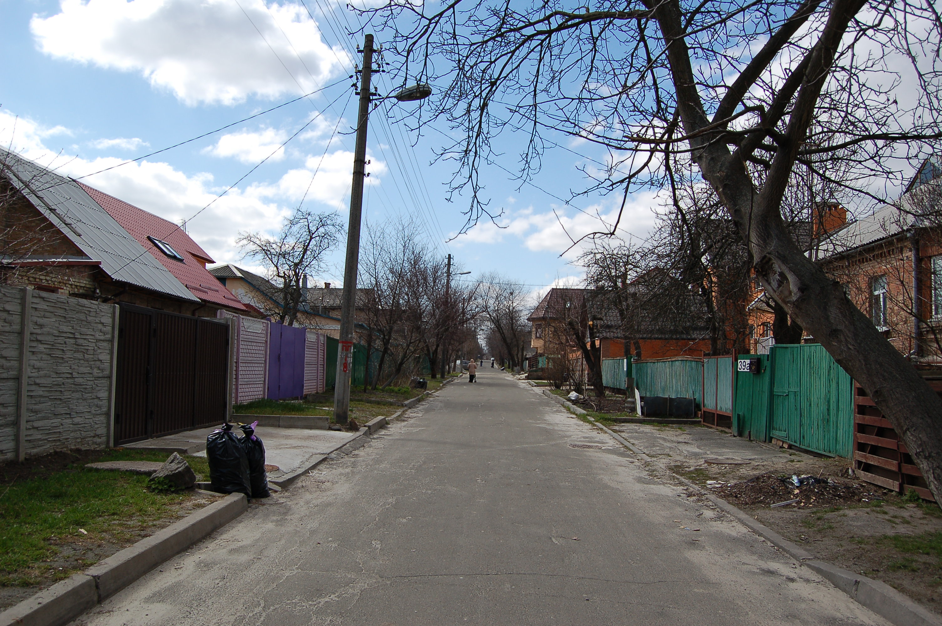 Улица Ивана Улитина в Киеве